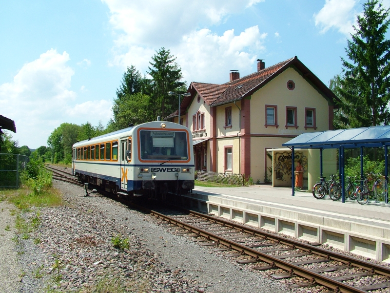 SWEG VT 120 im Endbahnhof Aglasterhausen.